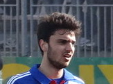 Match de football (Ligue 1) entre le Stade brestois 29 et l'Olympique lyonnais, le 3 mars 2013